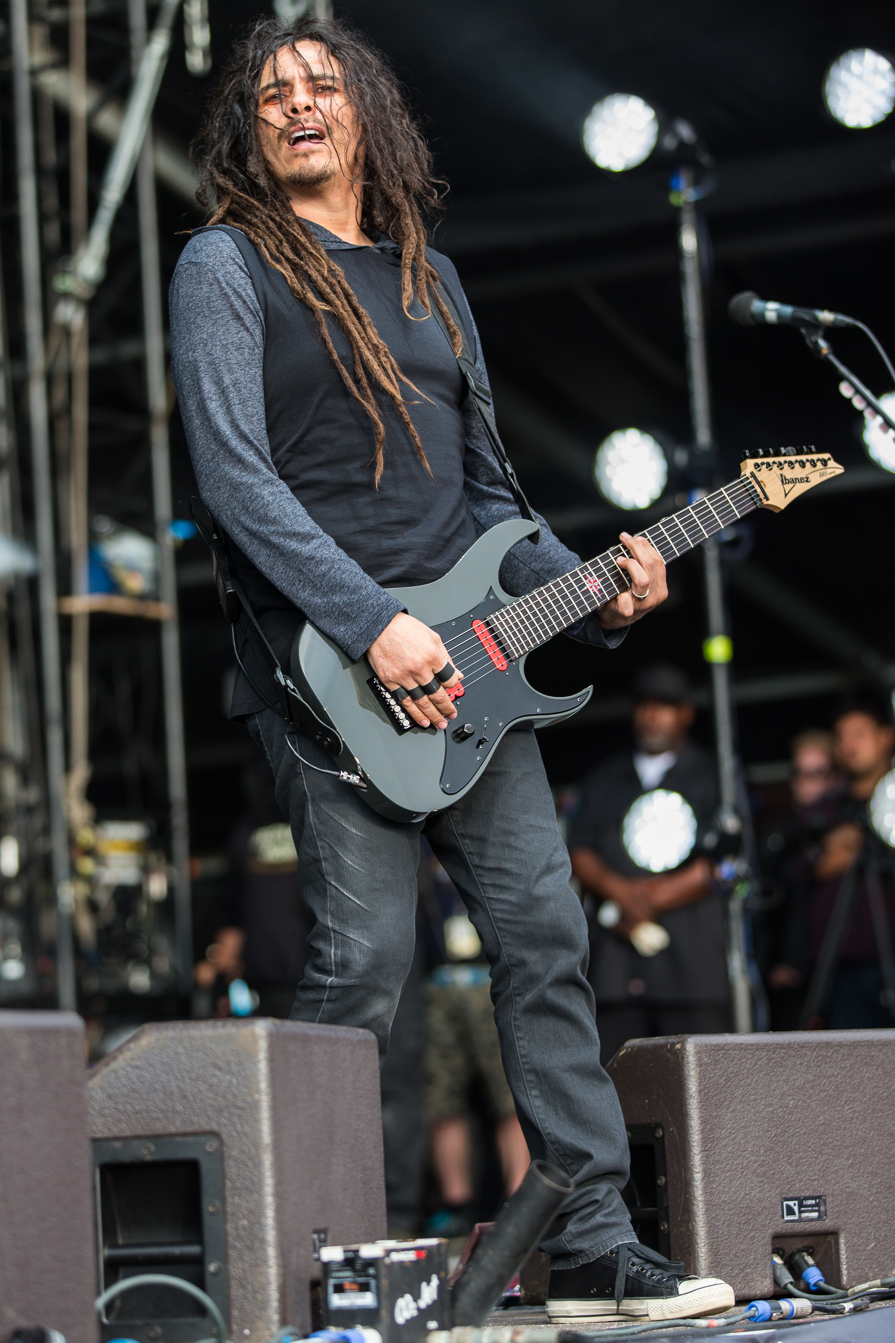 Rock'n'Heim Rock Festival Hockenheim August 2014